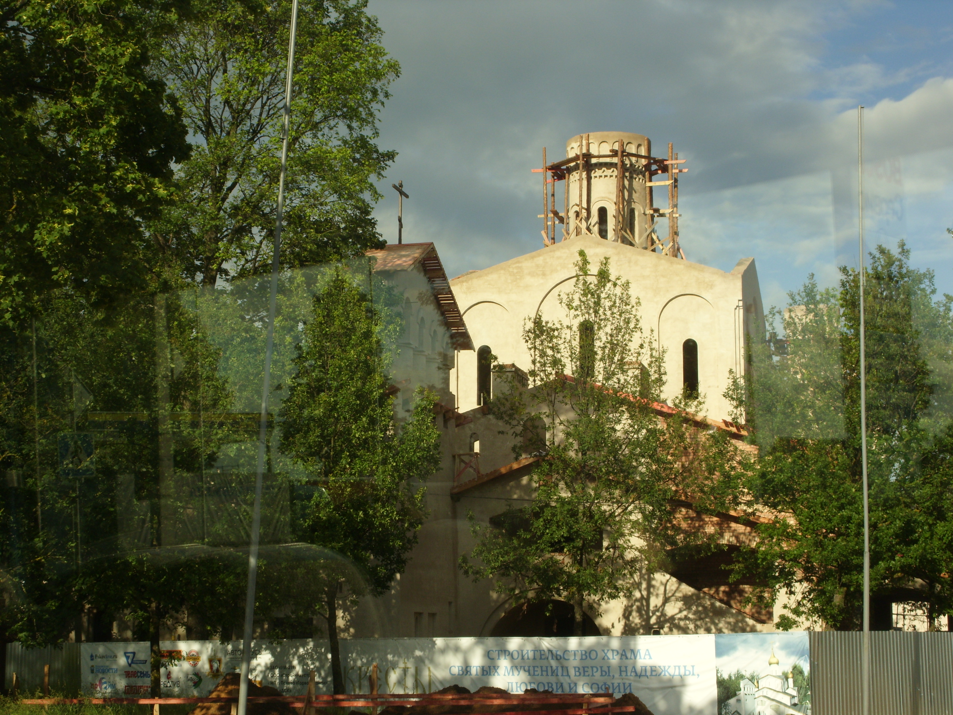 Pskov. Kresty